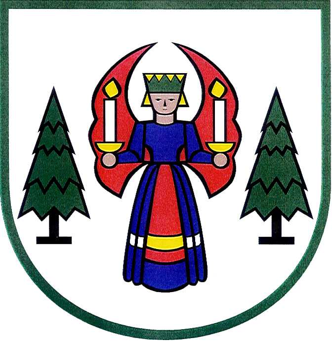 Wappen der Gemeinde Grünhainichen bis zur Neubildung der Einheitsgemeinde am 28. Februar 2009